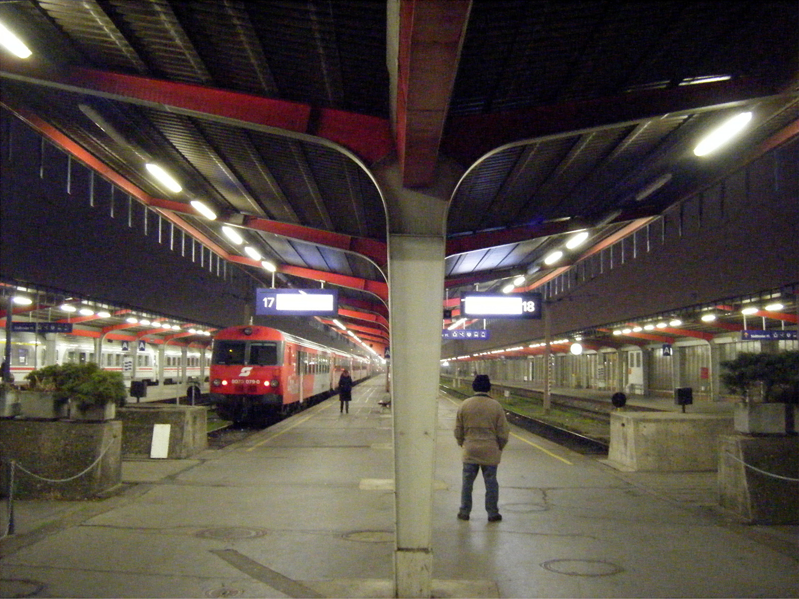 In Memoriam Südbahnhof...